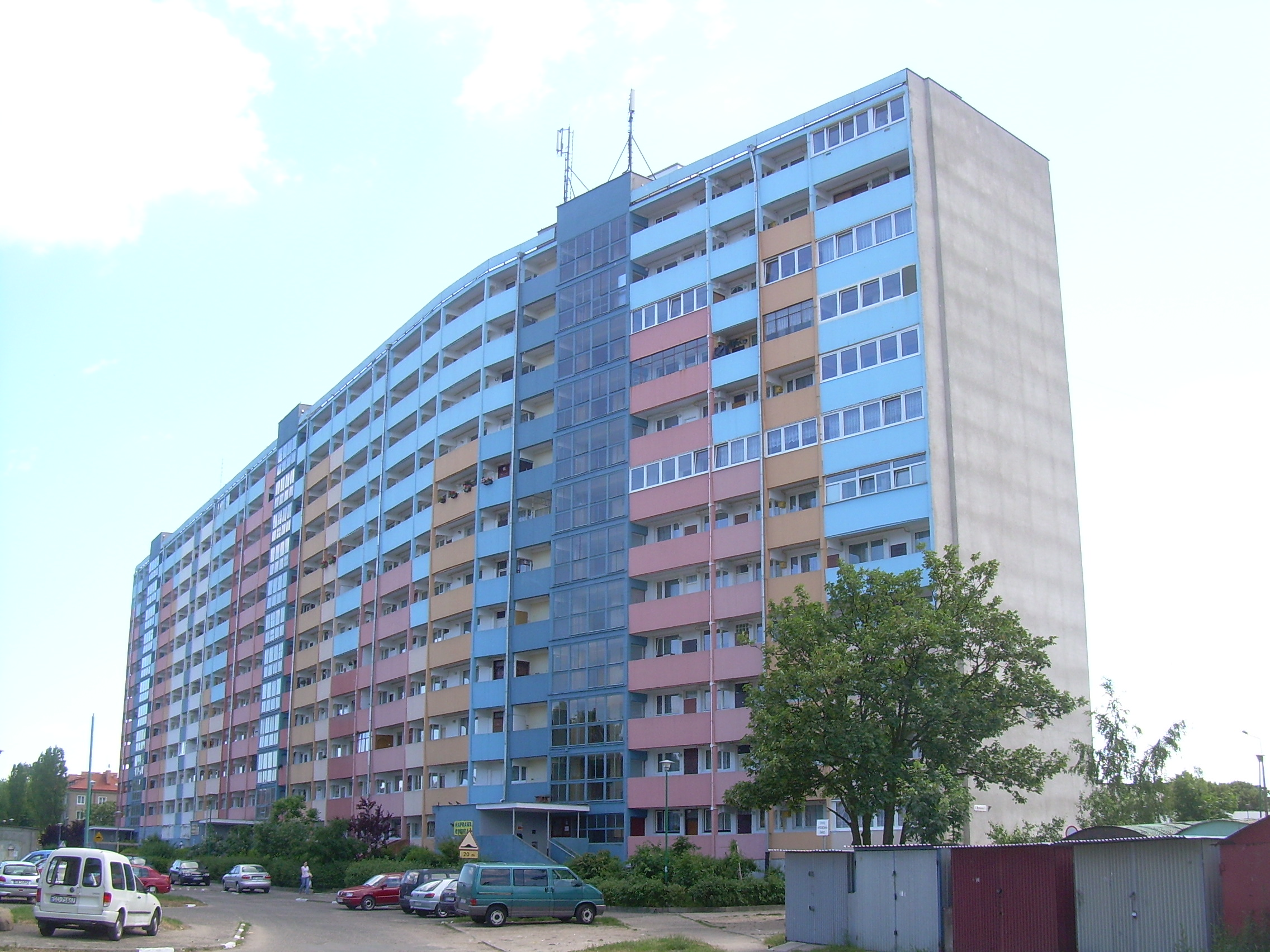 Gdańsk Nowy Port, ul. Wyzwolenia 51.